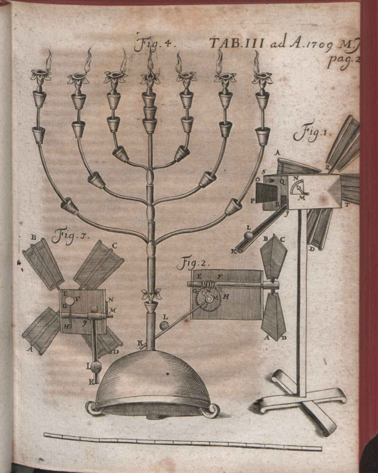 Illustration